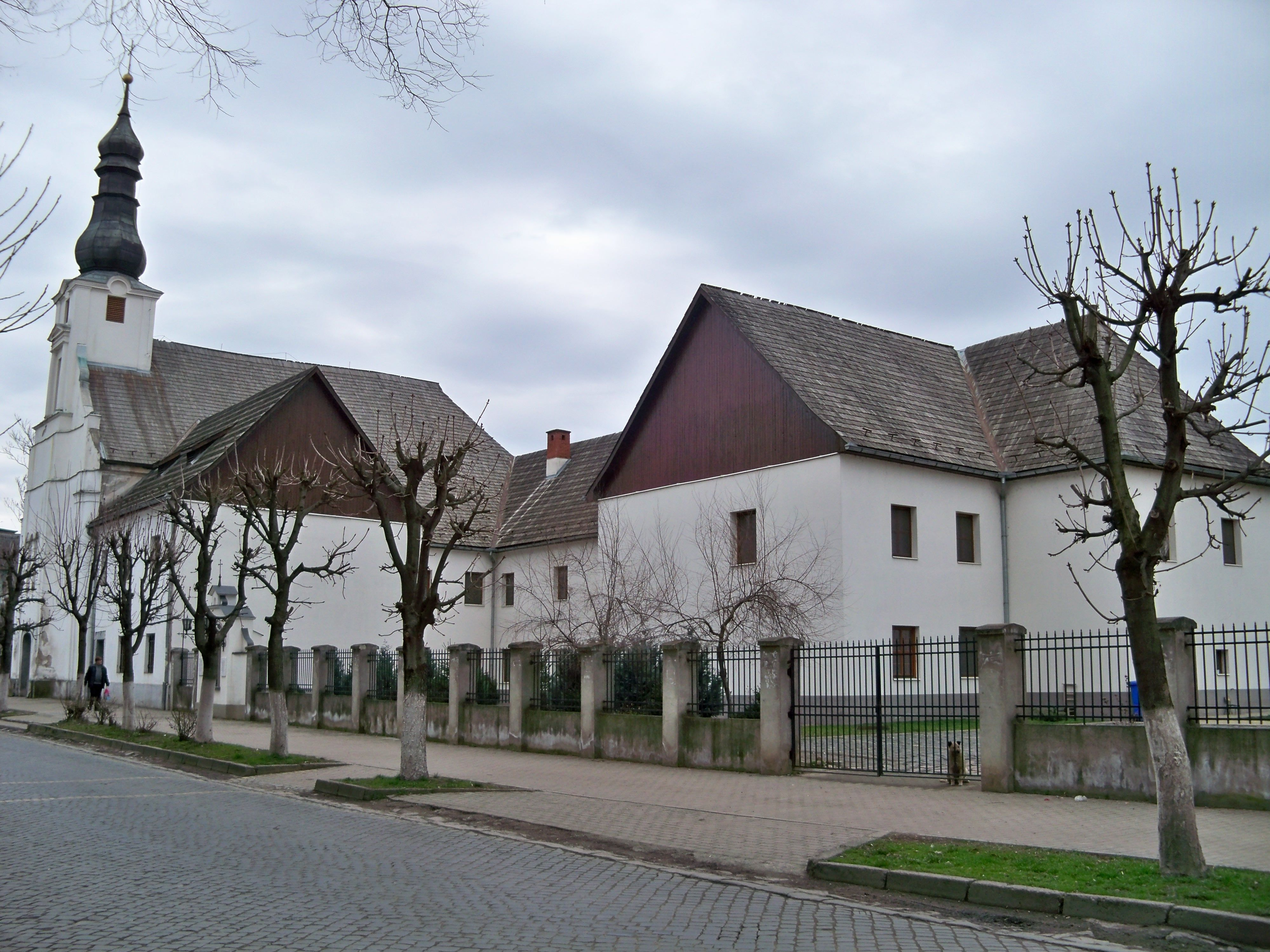 Францисканський монастир (мур.) :, Виноградів, вул.Миру, 3